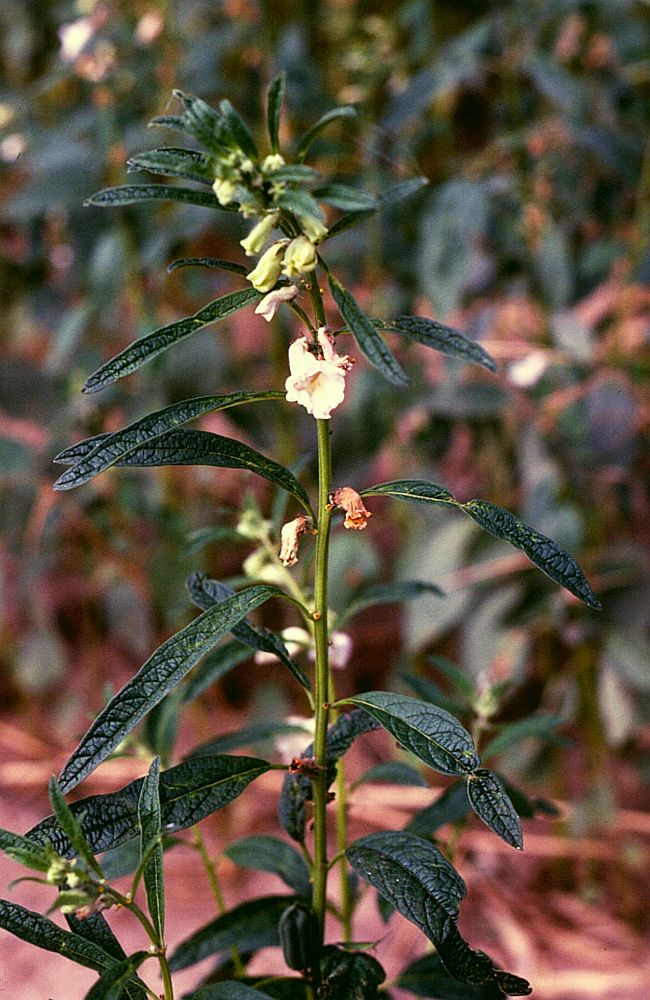 Sesamum indicum, Pedaliaceae - Kambodscha/Cambodia, Insel im Mekong bei Kratie (Prov. Kratie)